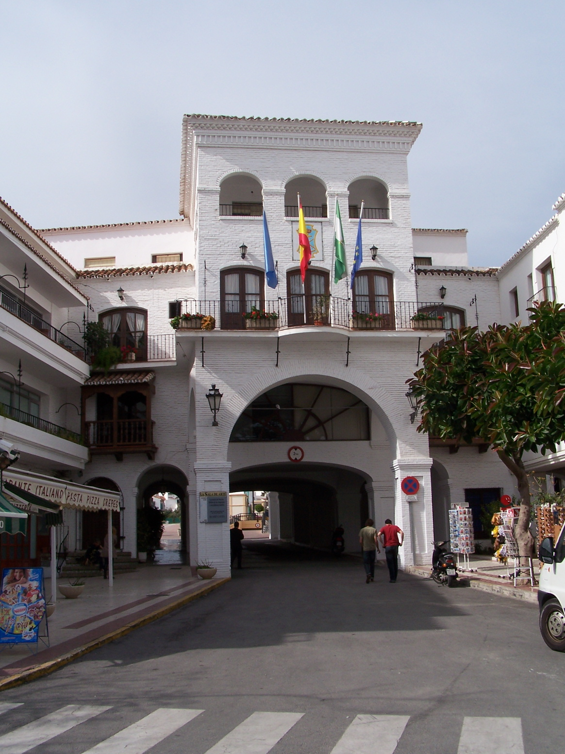 Nerja mairie